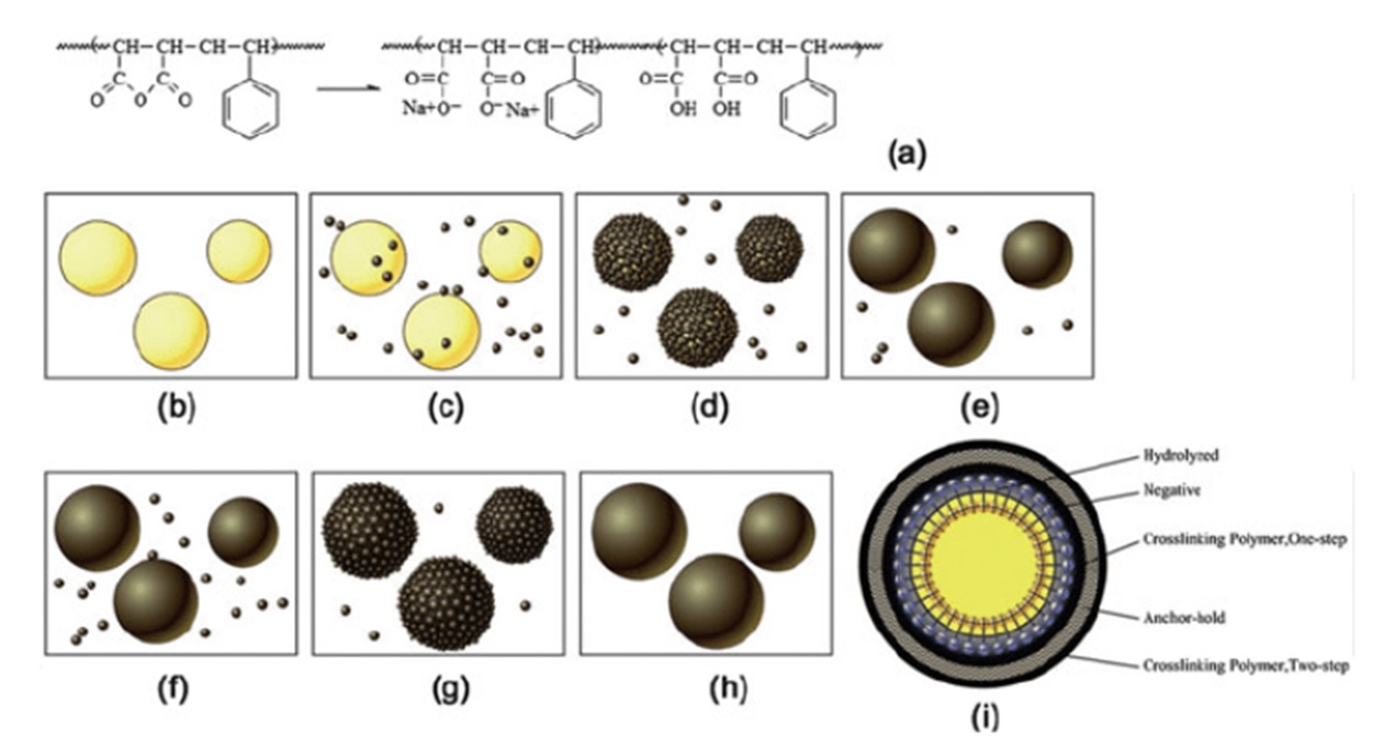 در این شکل ساختار دولایه ی میکرو کپسول ها دیده می شود که در داخل آنها مواد جوانساز هستند